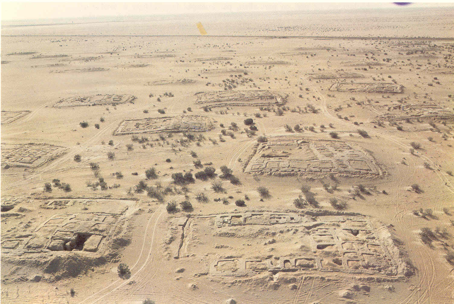 Le site archeologique des Kellia (Egypte)